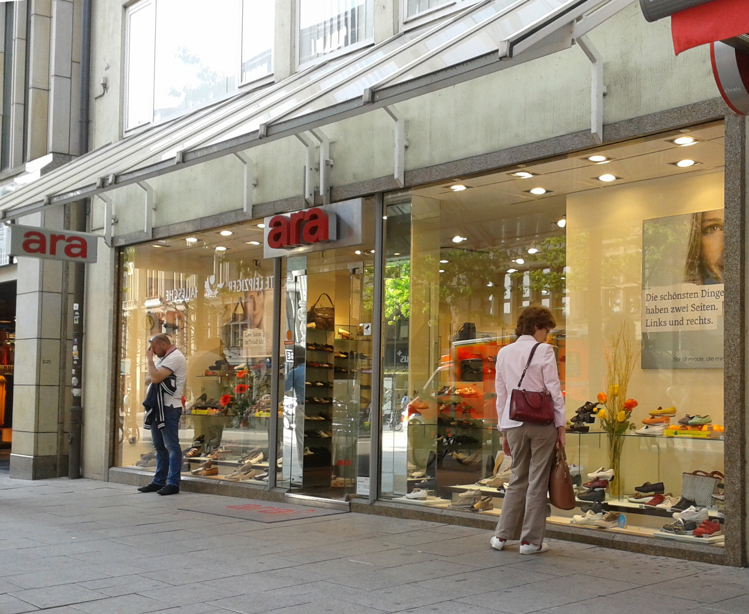 Ara Shoes-Geschäft in Hamburg, Mönckebergstr. 20